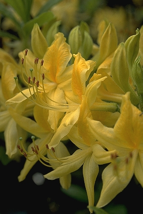 Azalee Rhododendron luteum